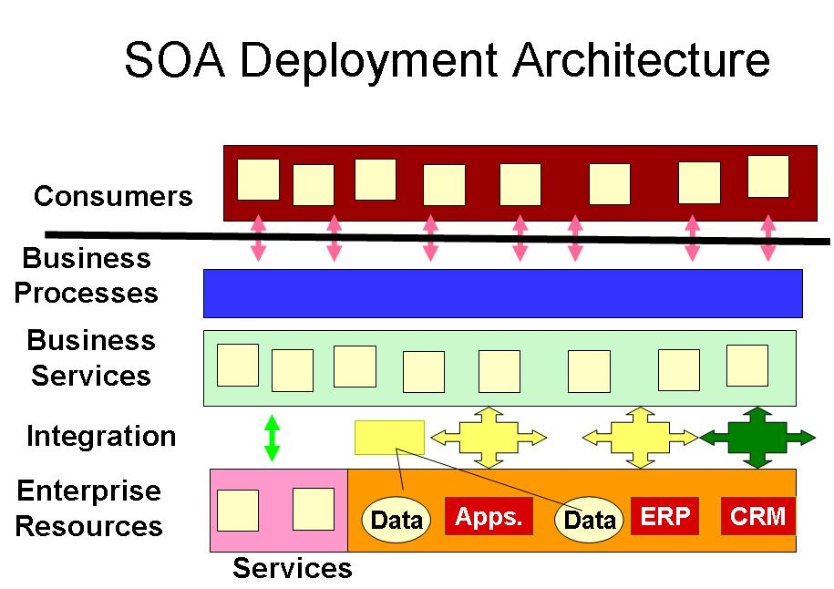 תיאור סבמטי של ארכיטקטורת SOA